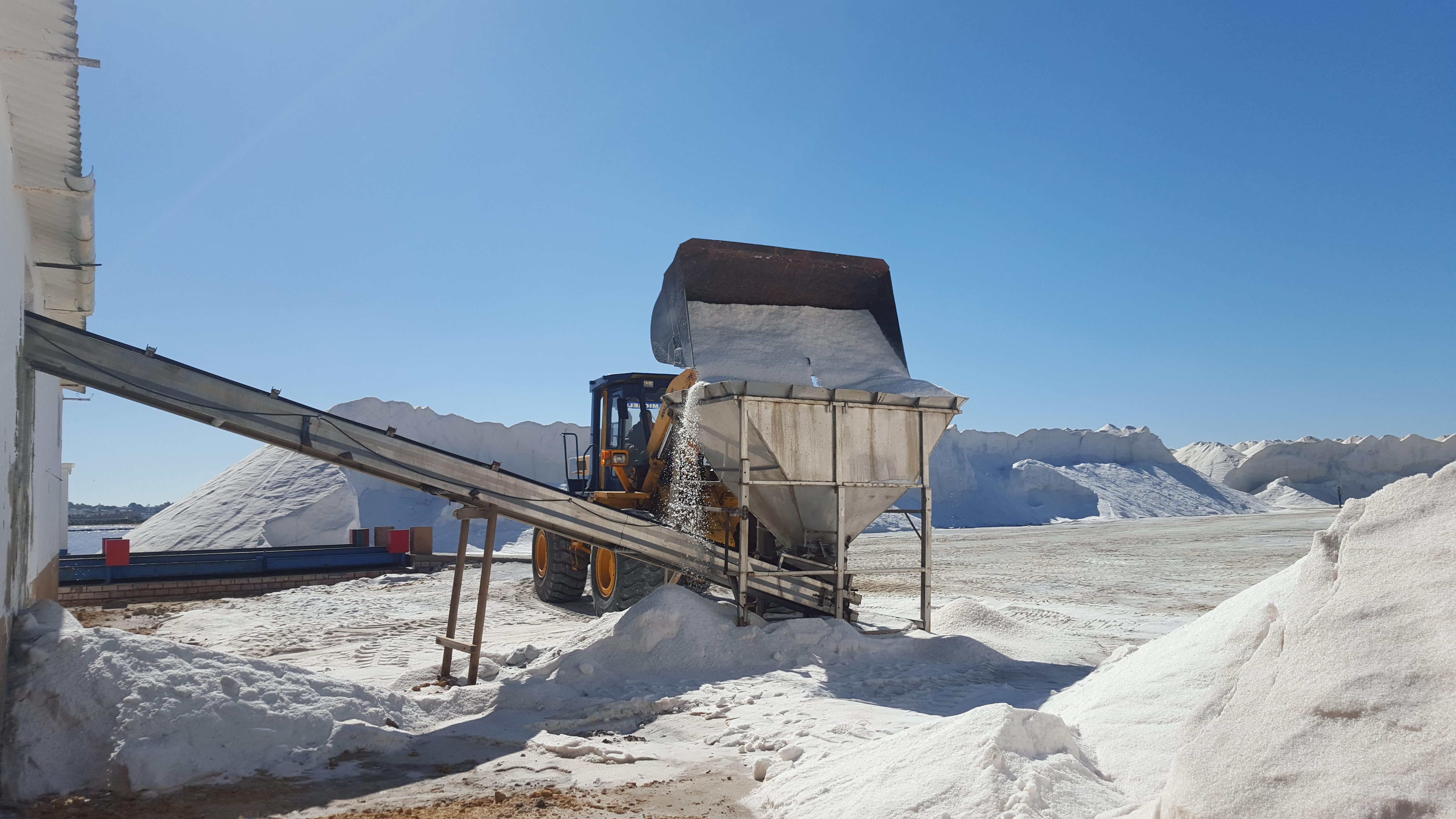 Operaciones de recogida de la sal en las salinas de Sanlúcar de Barrameda (provincia de Cádiz, España).